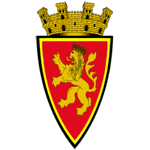 Emblema del Real Zaragoza en 1932